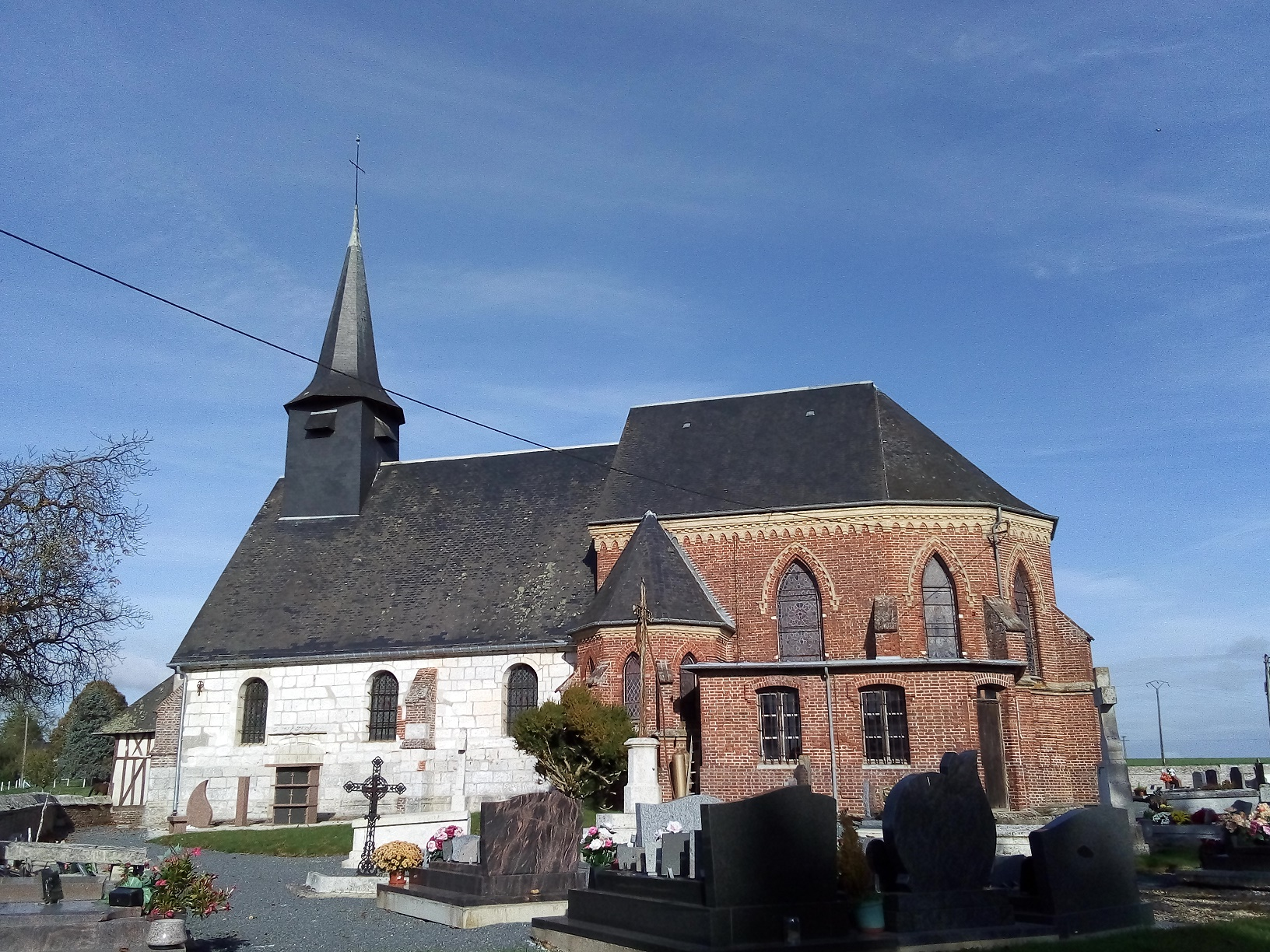 Église Saint-Aubin de Bosnormand (Eure, France)